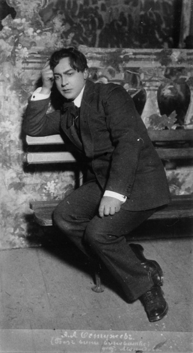 "Без вины виноватые"; А.Н.Островский; А. А. Остужев - Незнамов; режиссер А. П. Ленский; фотограф Леонидов; постановка 1908